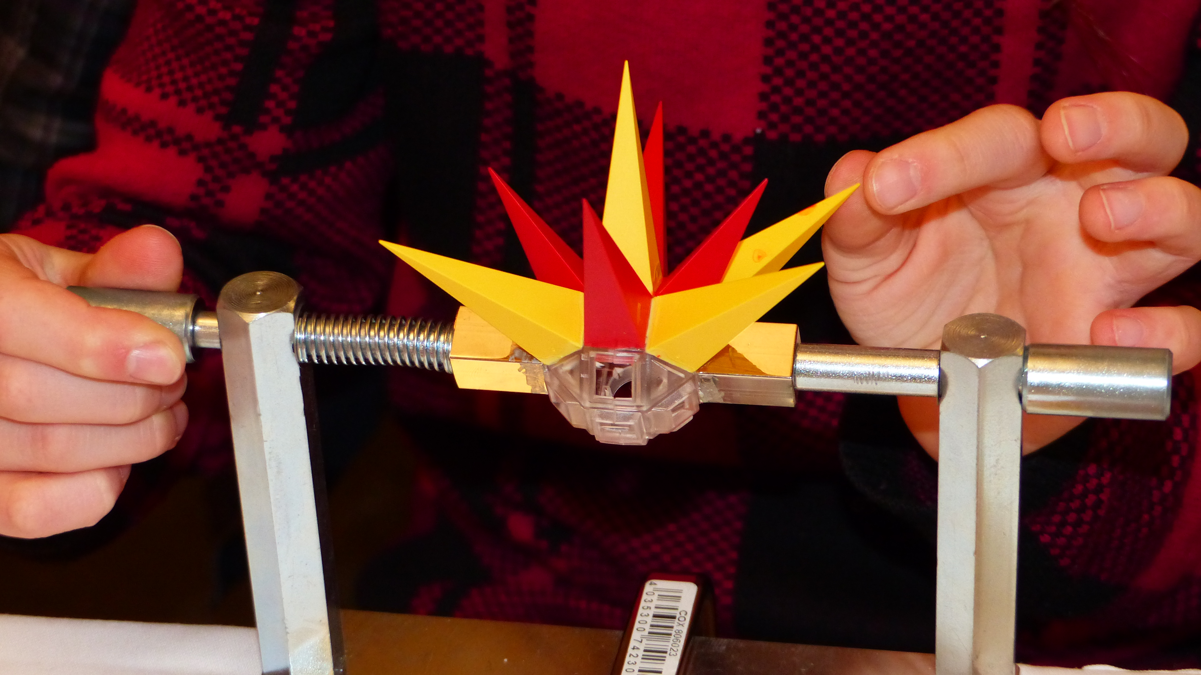 Herrnhuter Sterne auf einem Weihnachtsmarkt in Radebeul